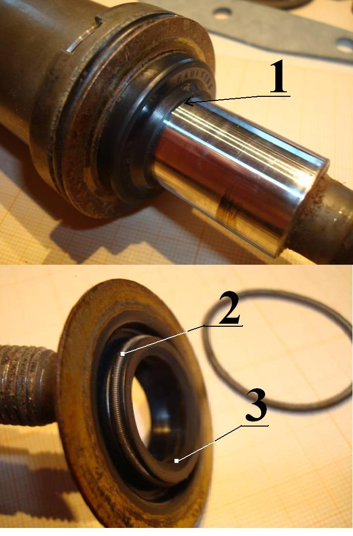 Photo de montage d'un joint à lèvre sur tige d'amortisseur.